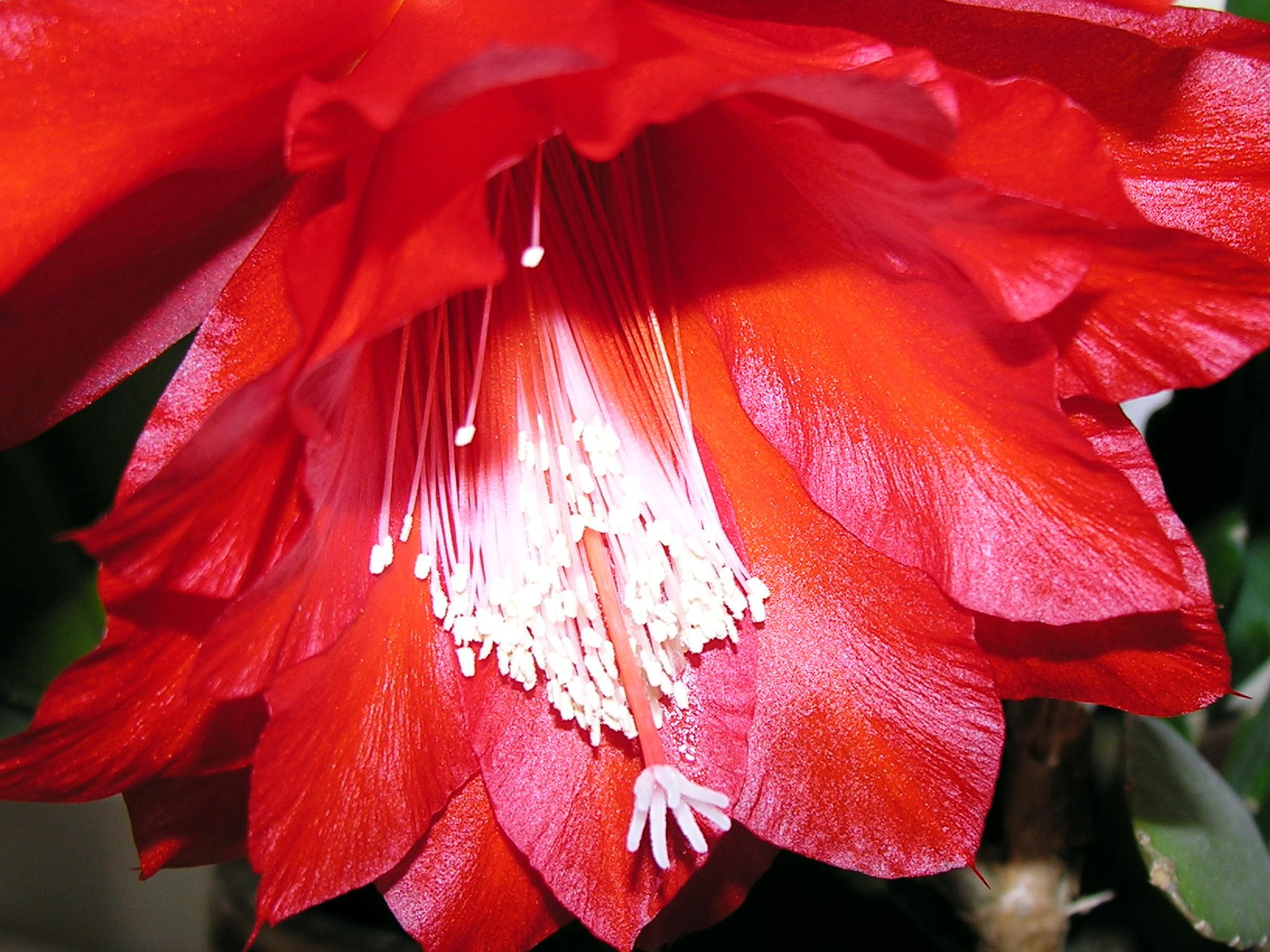 Lapenis (Epiphyllum) Šeima. Kaktusiniai (Cactaceae) Foto: Algirdas, 2006 m. gegužės 9 d.